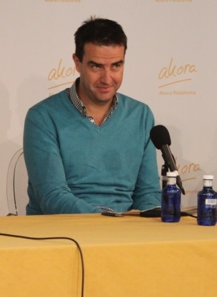 Gorka Maneiro Fotografía propia